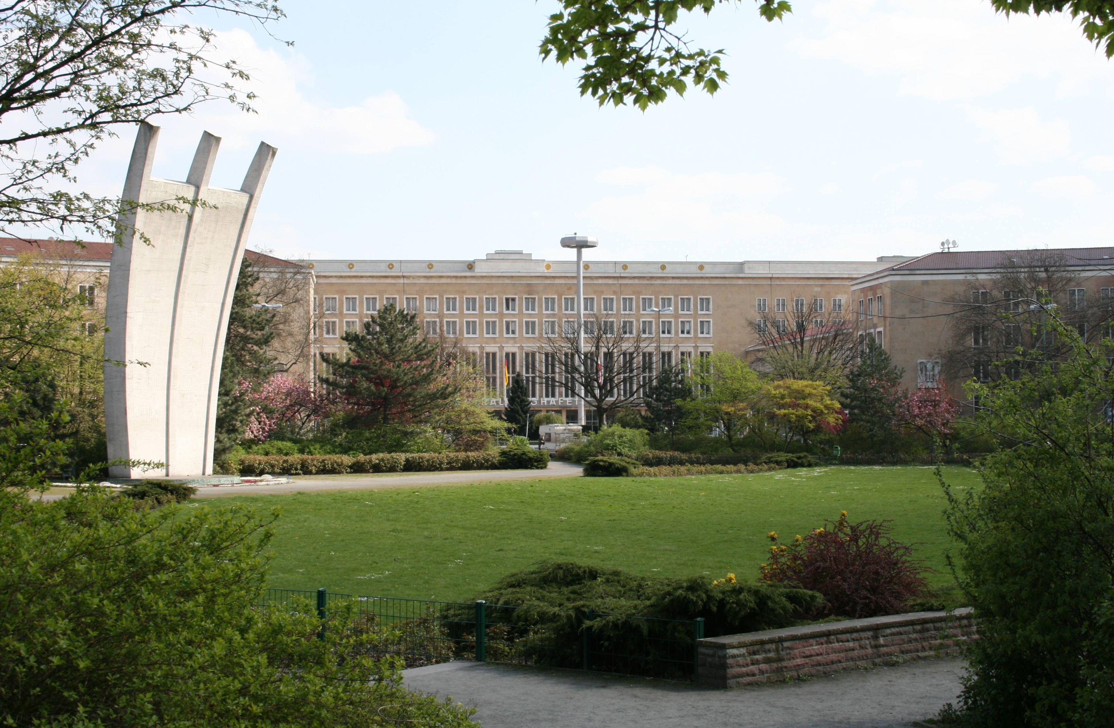 Platz der Luftbrücke vor dem Flughafen Tempelhof in Berlin